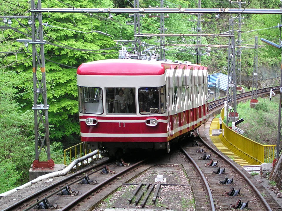 Nankai Koyasan Cable funicular.